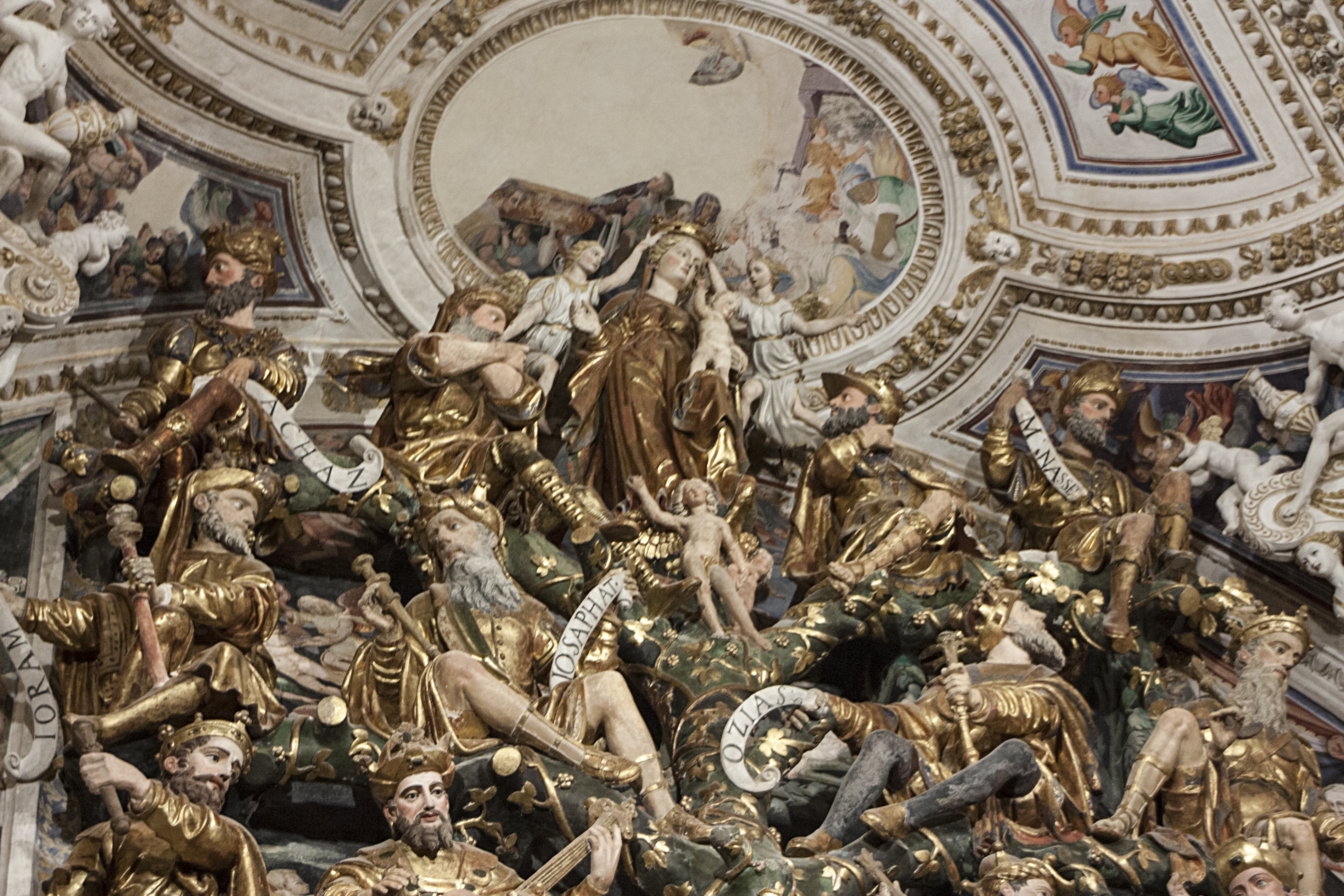 Chiesa di San Domenico (Castelvetrano)